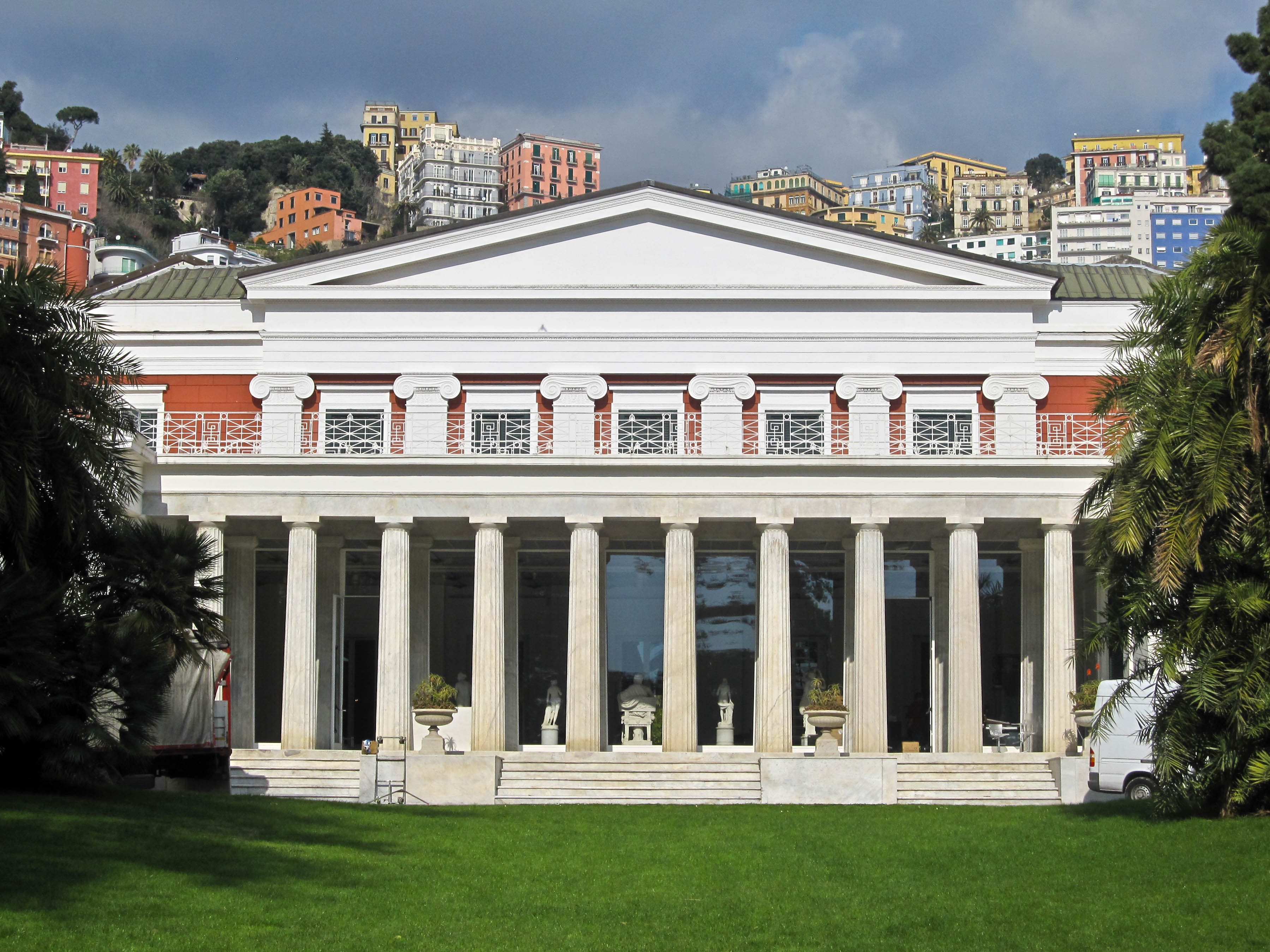 Facciata di Villa Pignatelli - Napoli.